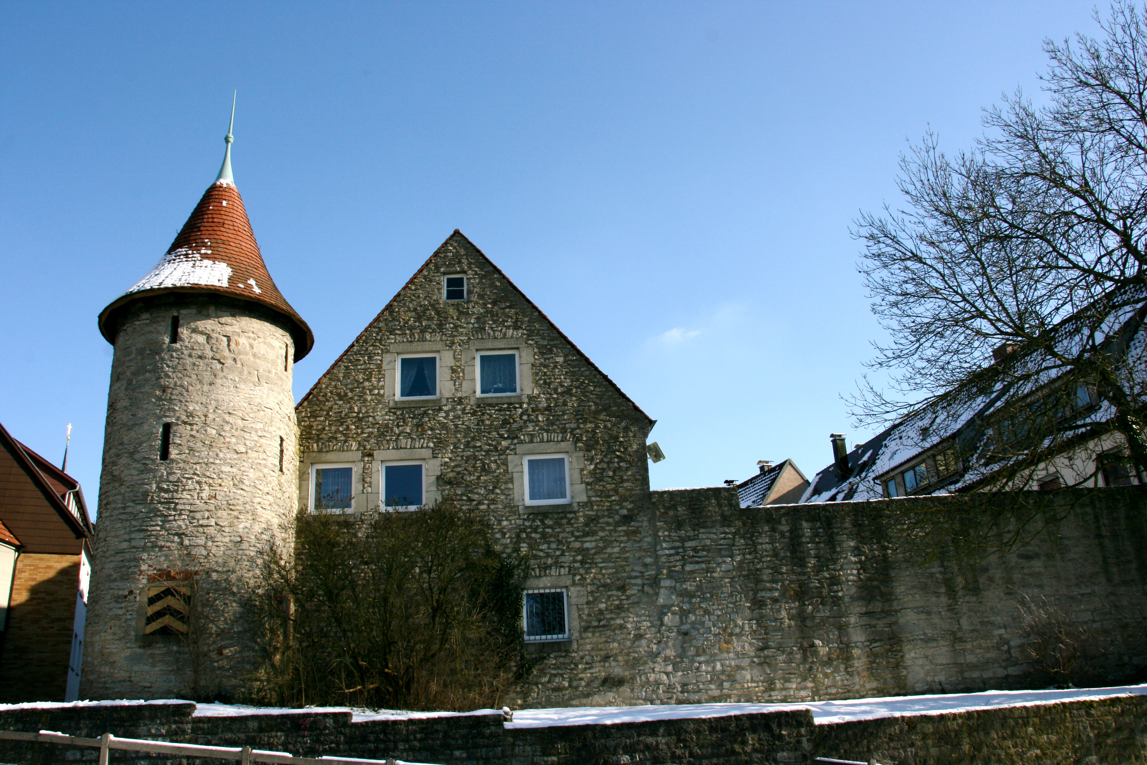 historische Stadtmauer von Crailsheim